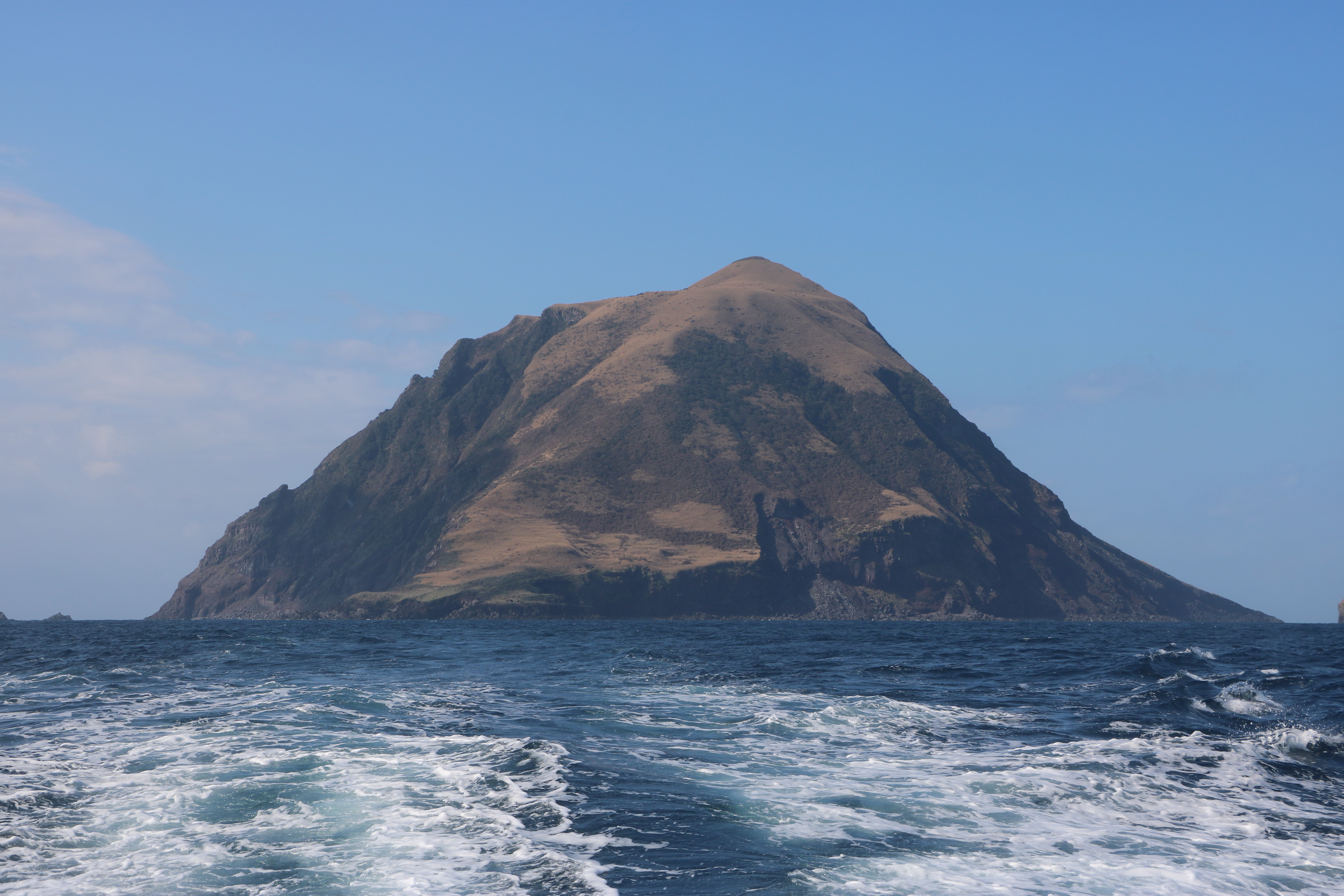 八丈小島の東海上からの眺め（東京都八丈町）